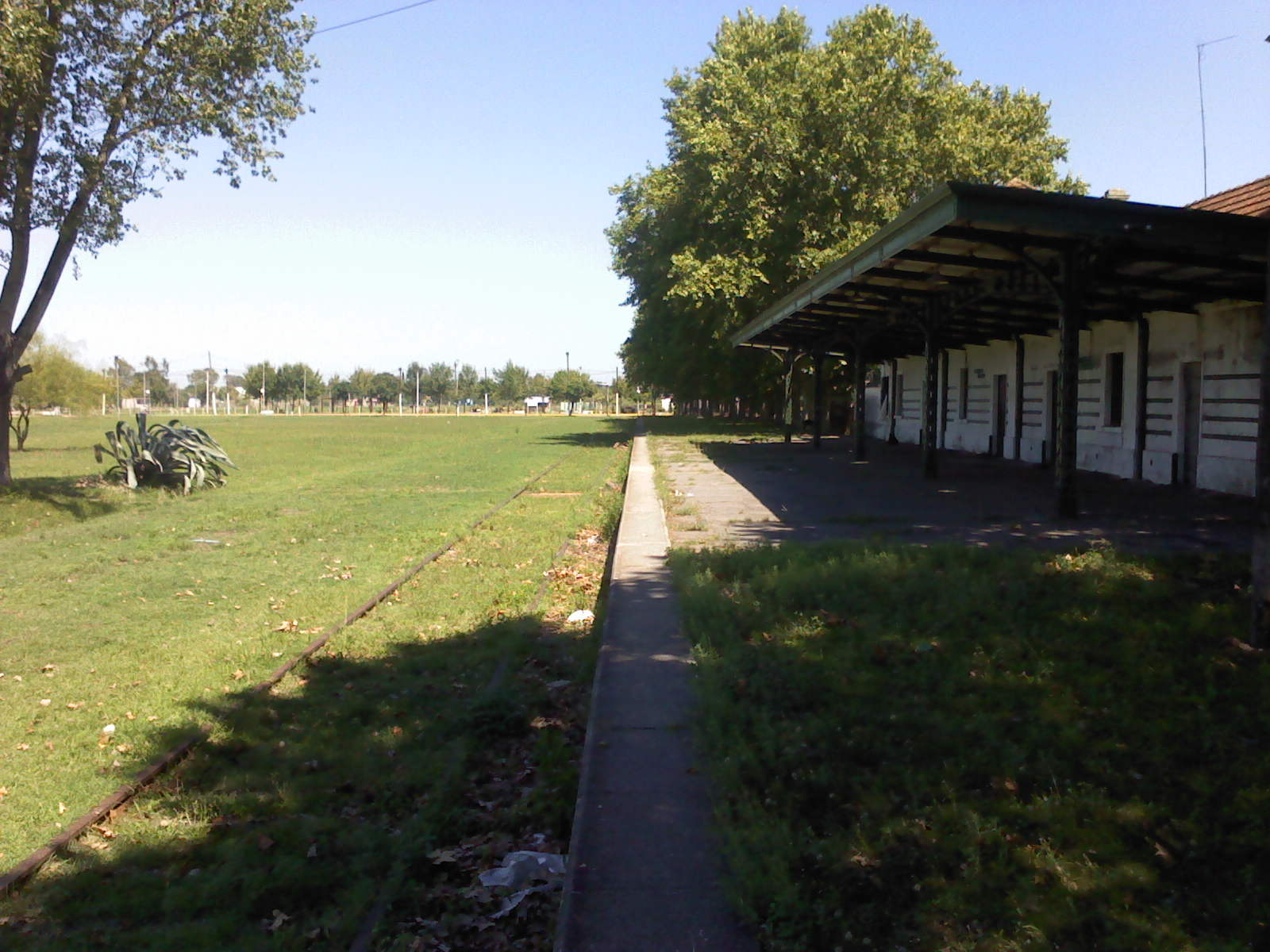 Vista desde el andén hacia la punta de rieles de San Vicente.